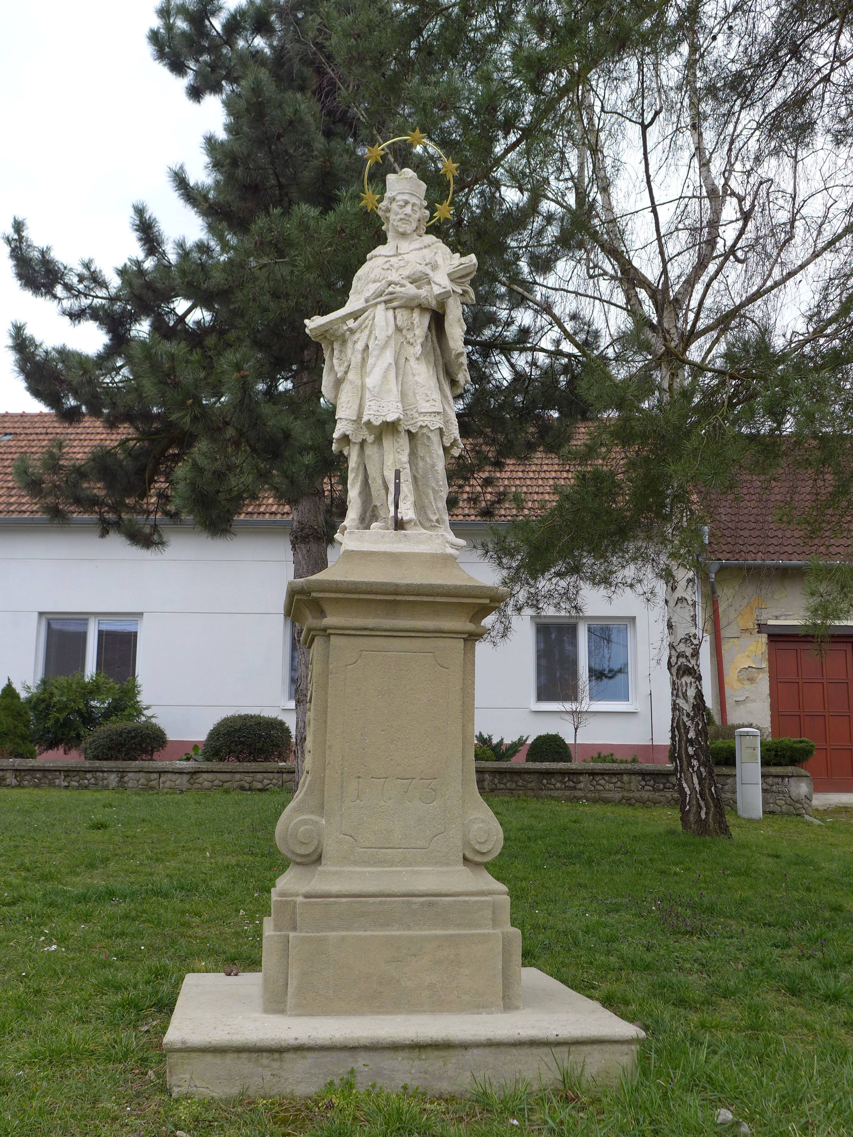 Socha svatého Jana Nepomuckého, parc. 2827, Rakšice.